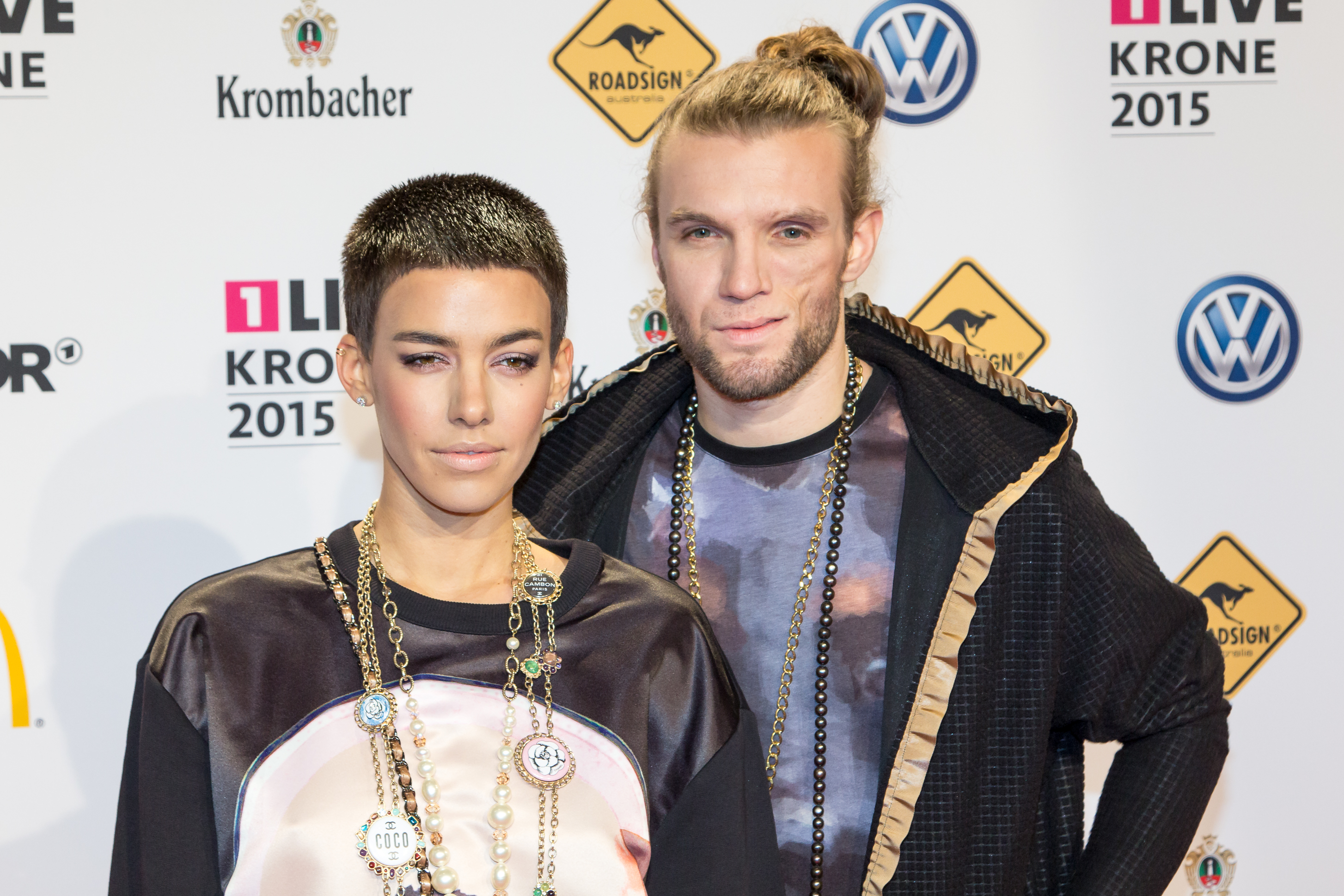 1LIVE Krone 2015 - Alina Süggeler und Andreas Weizel von Frida Gold